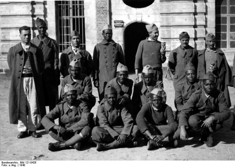 Kriegsgefangene